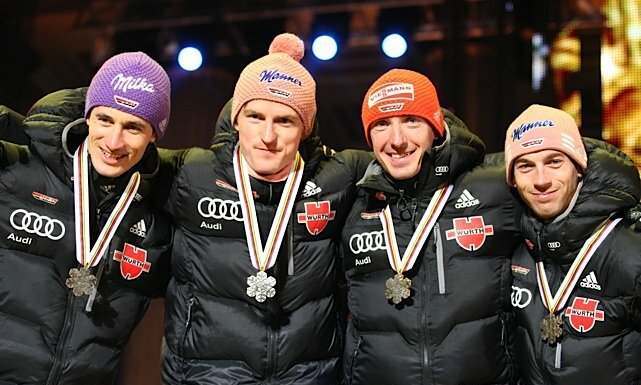 Martin Schmitt, Severin Freund, Michael Uhrmann i Michael Neumayer podczas ceremonii medalowej po konkursie drużynowym mężczyzn na skoczni normalnej w ramach Mistrzostw Świata w Narciarstwie Klasycznym 2011 w Oslo.